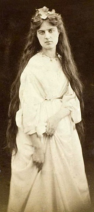 Marie Spartali Stillman, Albumen silver print from wet-collodion glass negative